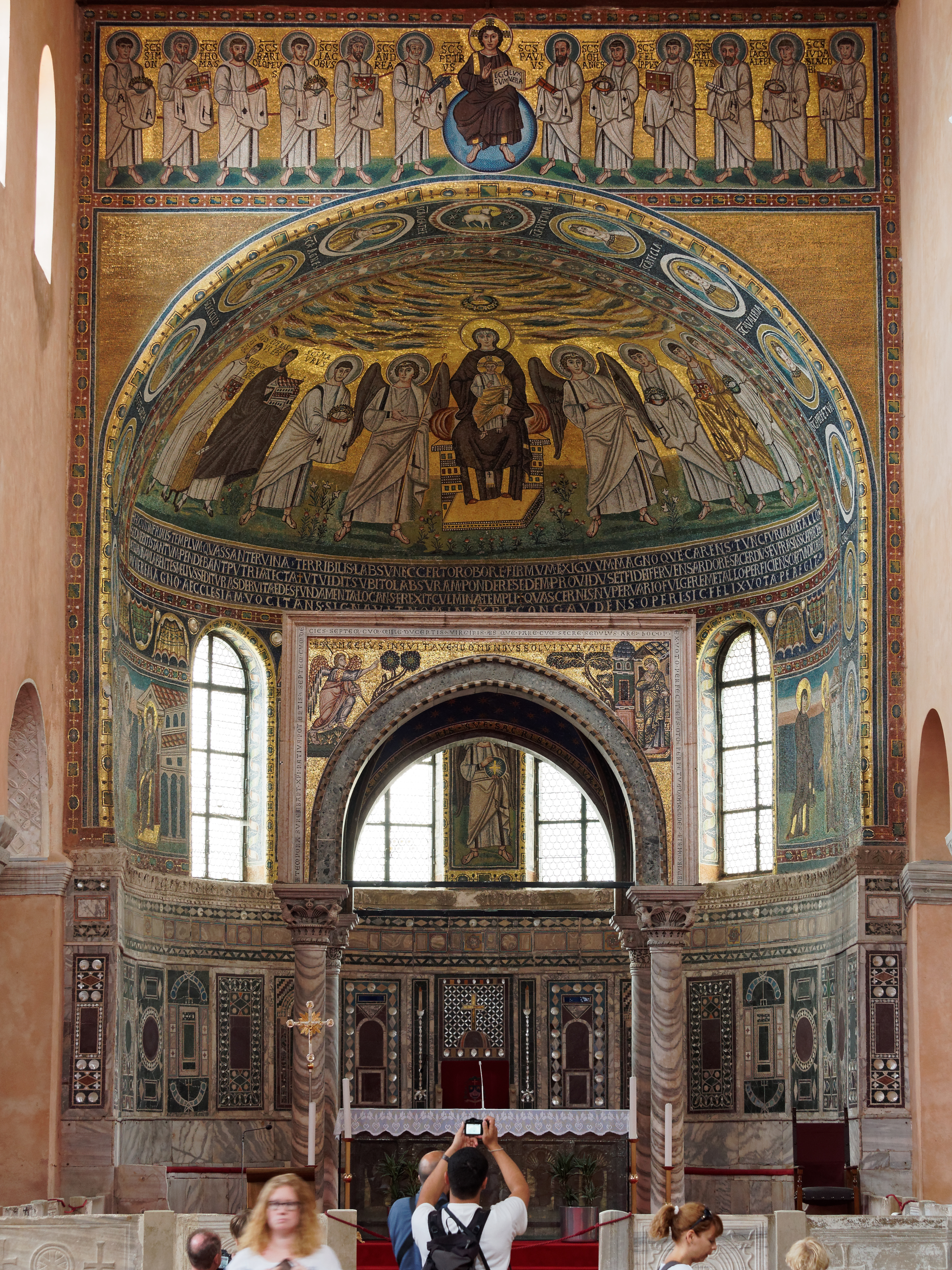 Die Euphrasius-Basilika in Poreč, Kroatien, Blick auf den Chor.